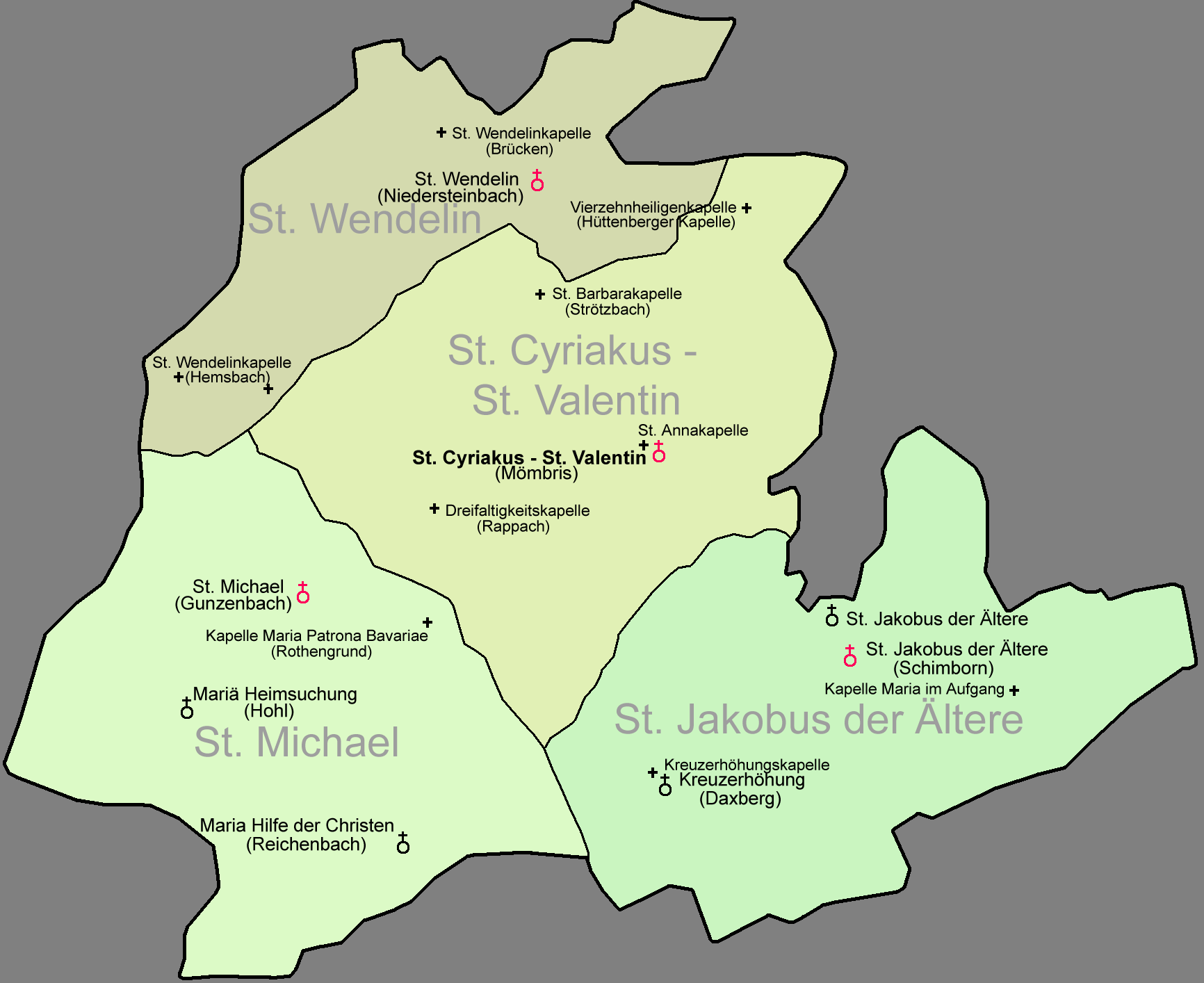 Gliederung der Pfarreiengemeinschaft Mittlerer Kahlgrund Fläche einer Pfarrei Grenze einer Pfarrei Filialkirche Pfarrkirche Sankt Name der Pfarrei Sankt Verwaltungssitz der Pfarrgemeinschaft (Fettschrift) Kapelle